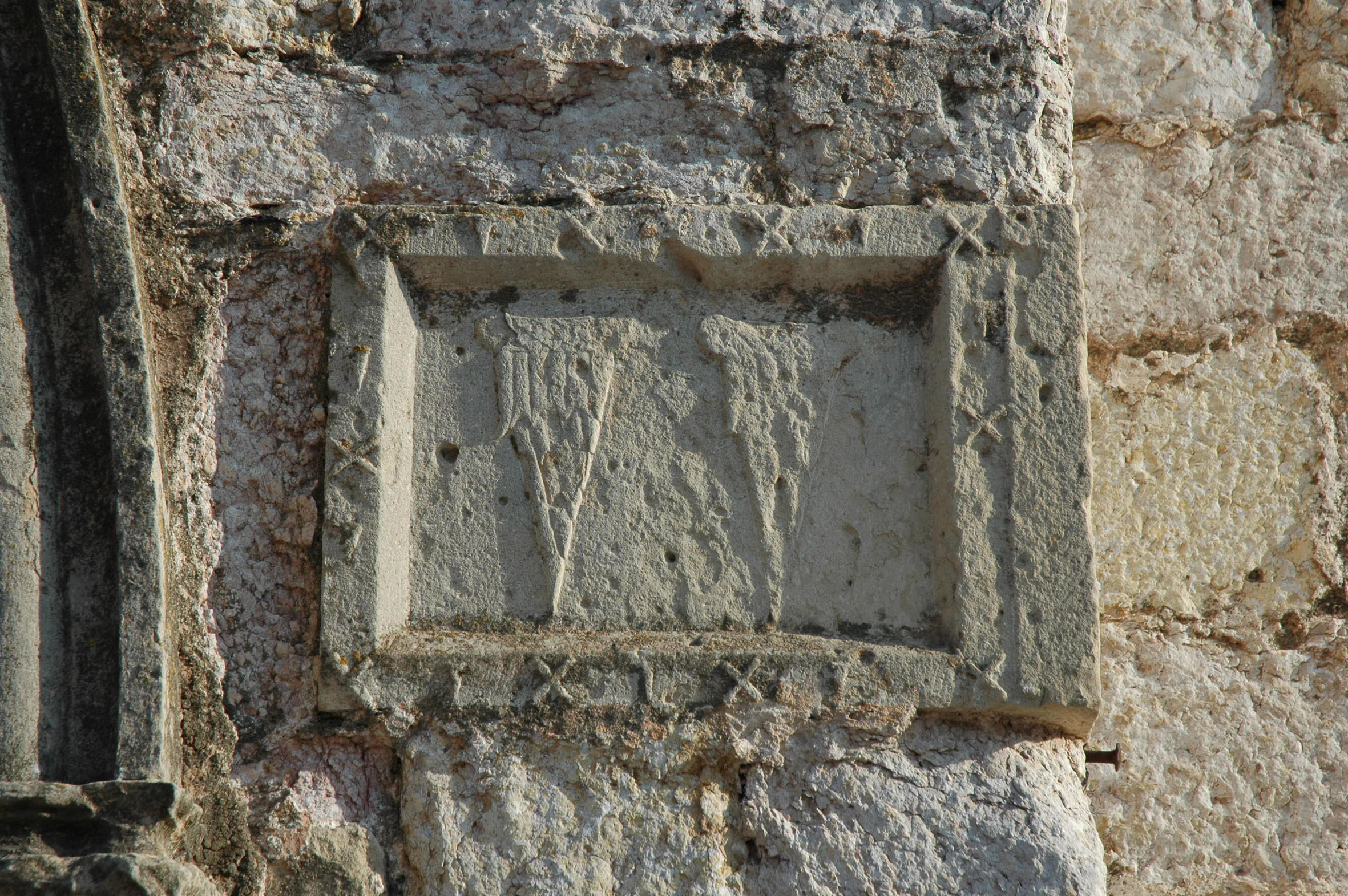 S. Francesc de Montblanc. Plafó heràldic de la família Marçal (¿), situat al costat dret de la porta principal.